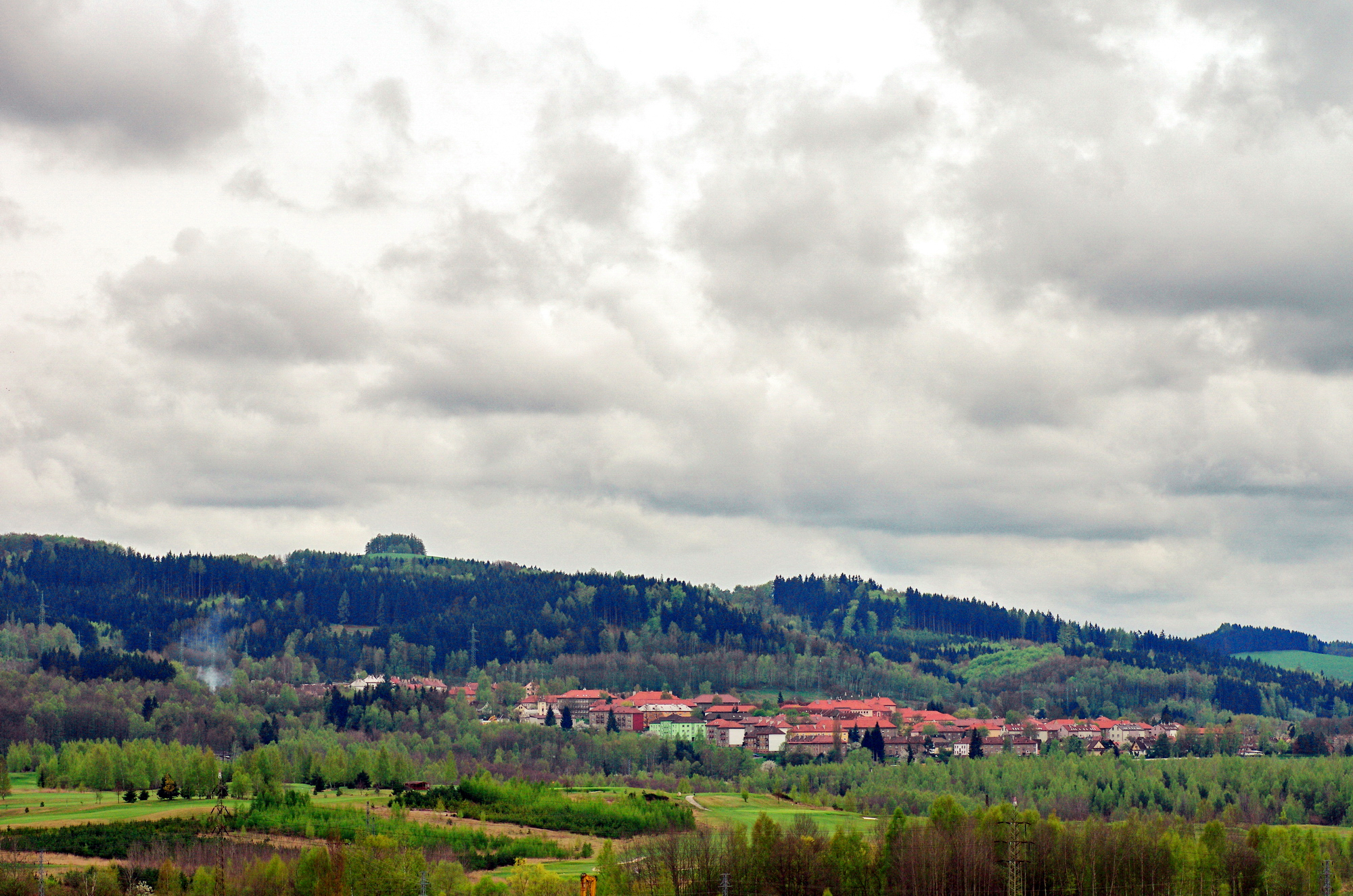 pohled na Březovou od Sokolova, okres Sokolov